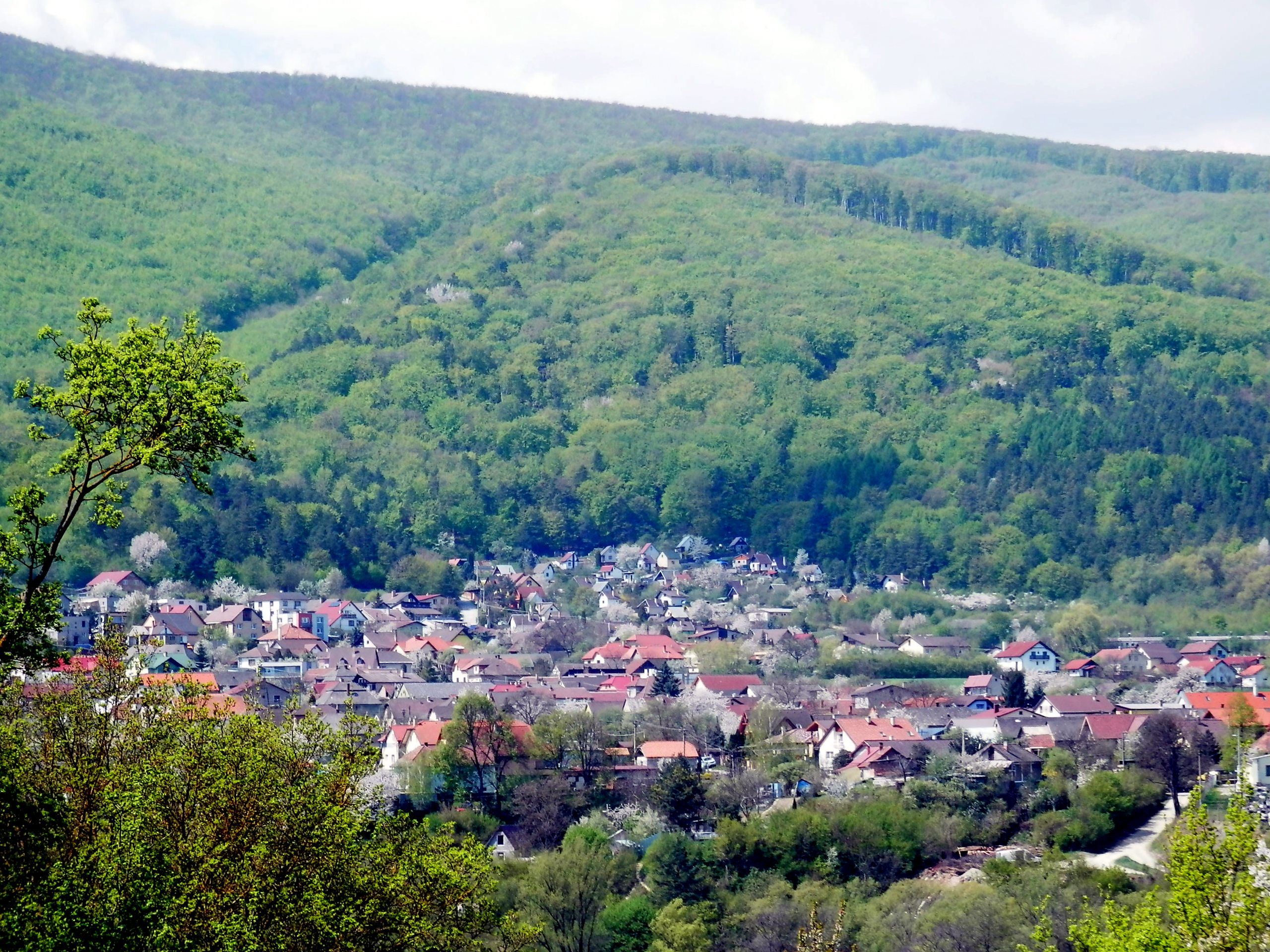 Obec Sokoľ, pohľad od kostola v Malej Vieske. Okres Košice okolie.